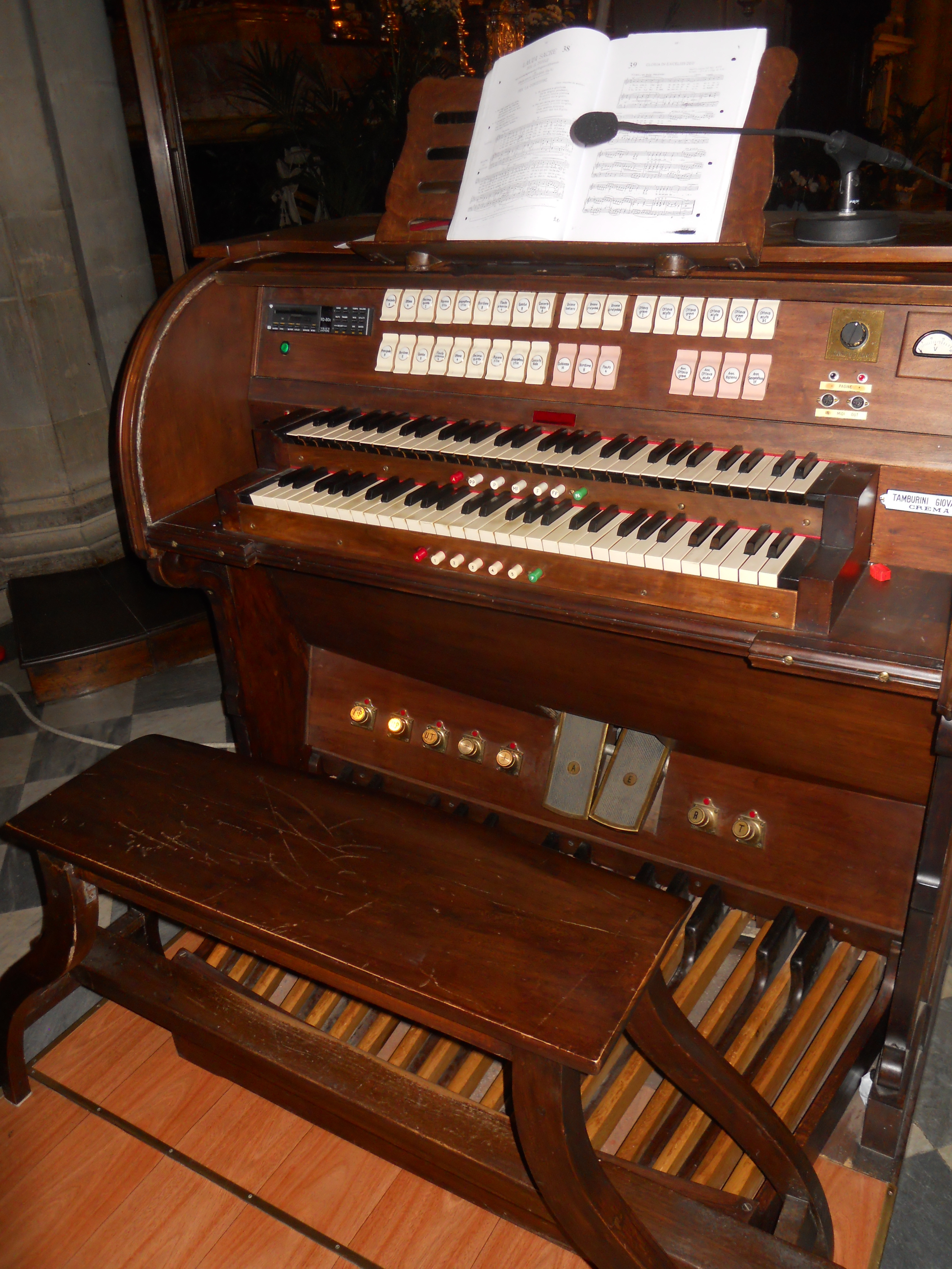 La consolle dell'organo Tamburini opus 76, costruito nel 1922, nella cappella della Madonna del Conforto del duomo di Arezzo.